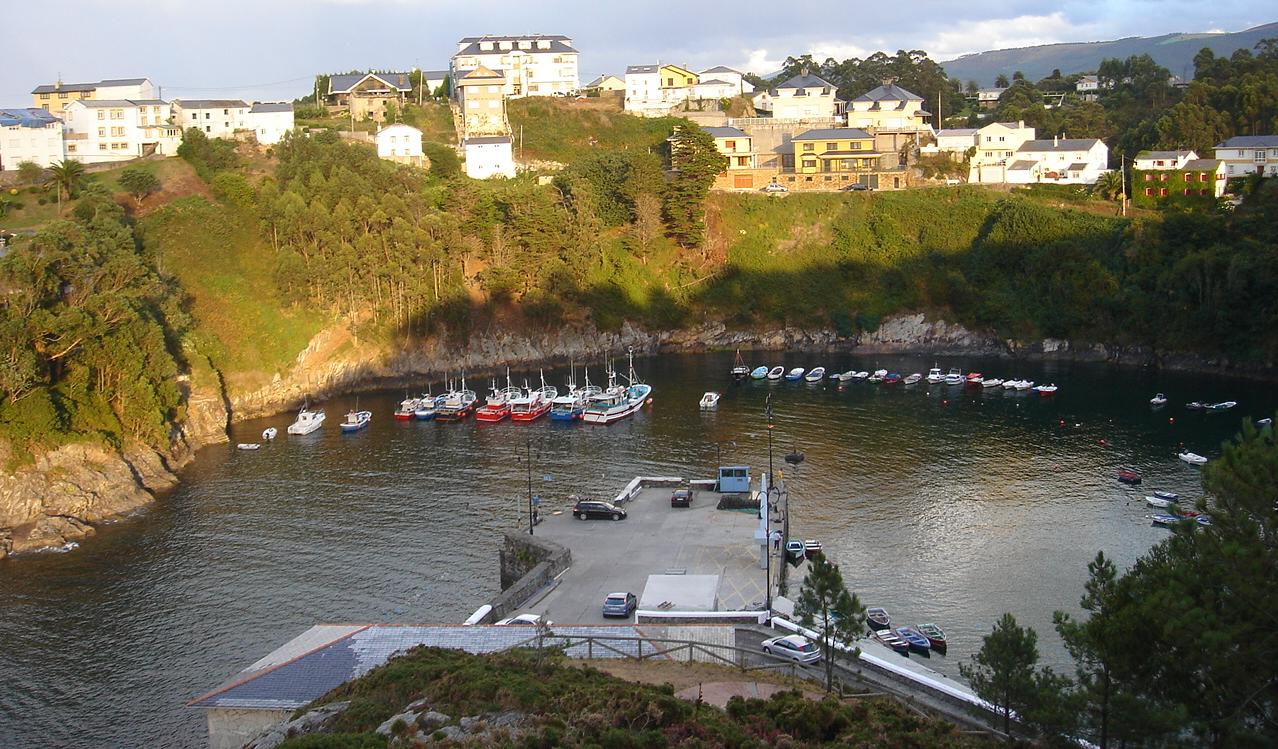 Puerto de Viavelez